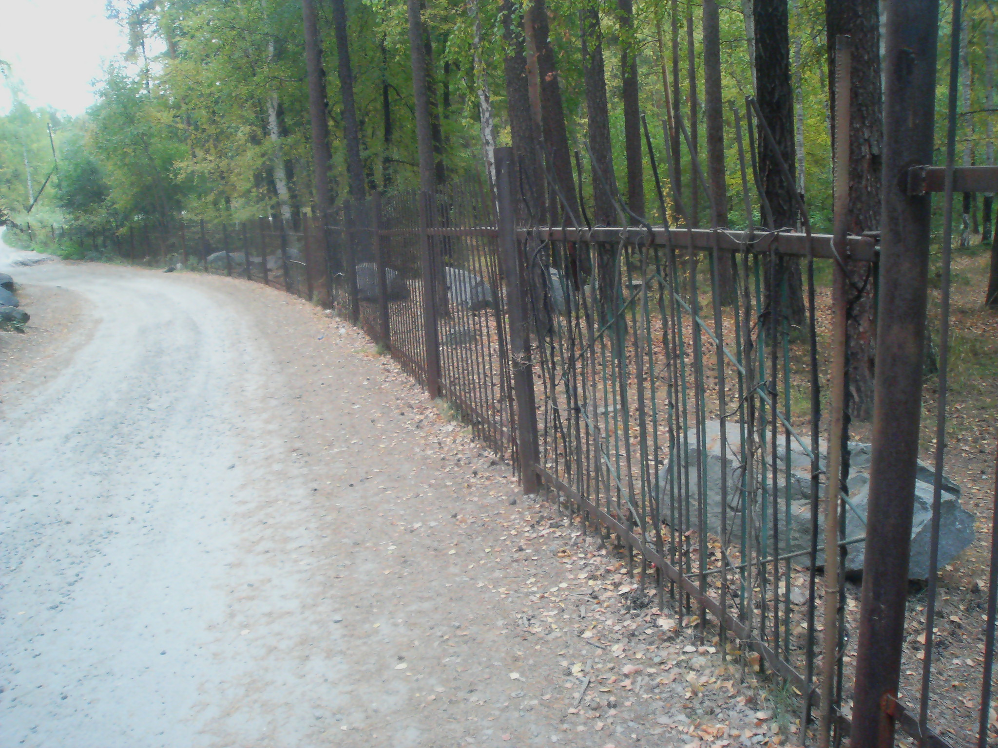 восточный берег